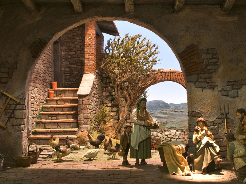 Exponat des Klüsserather Krippenmuseums